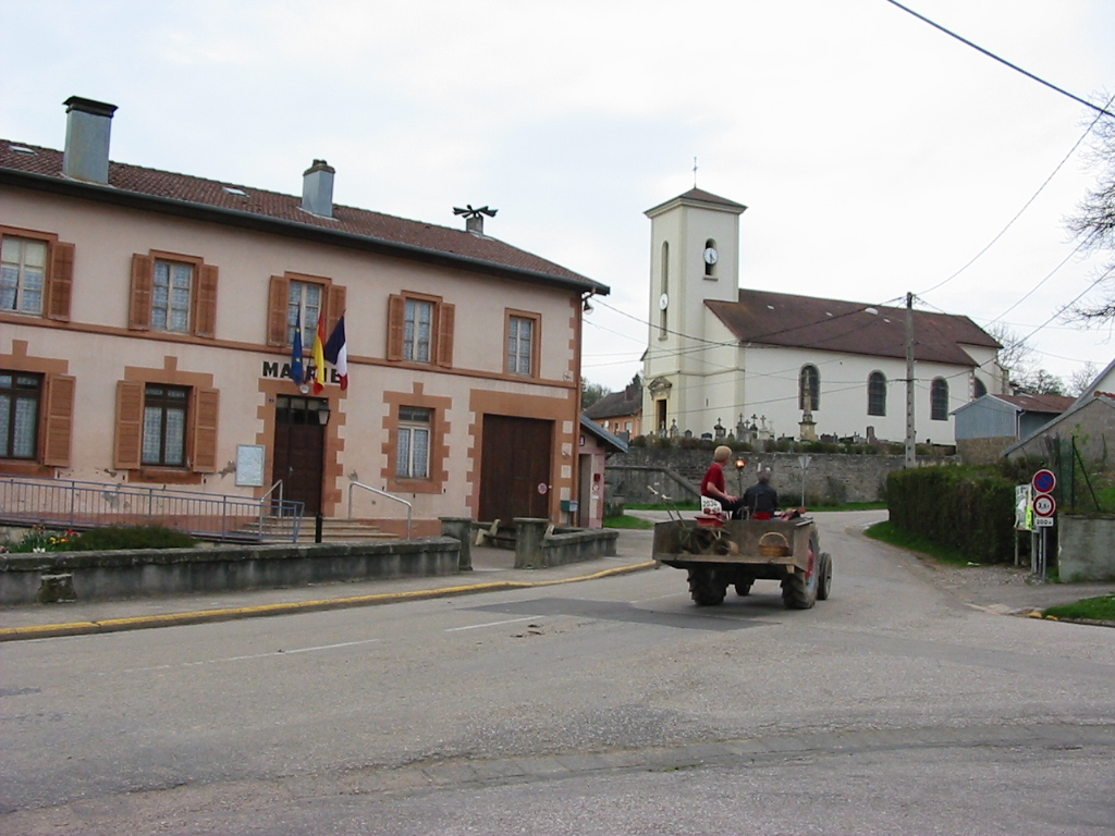 Brû (département des Vosges, France) ; le centre du village ; mairie et église